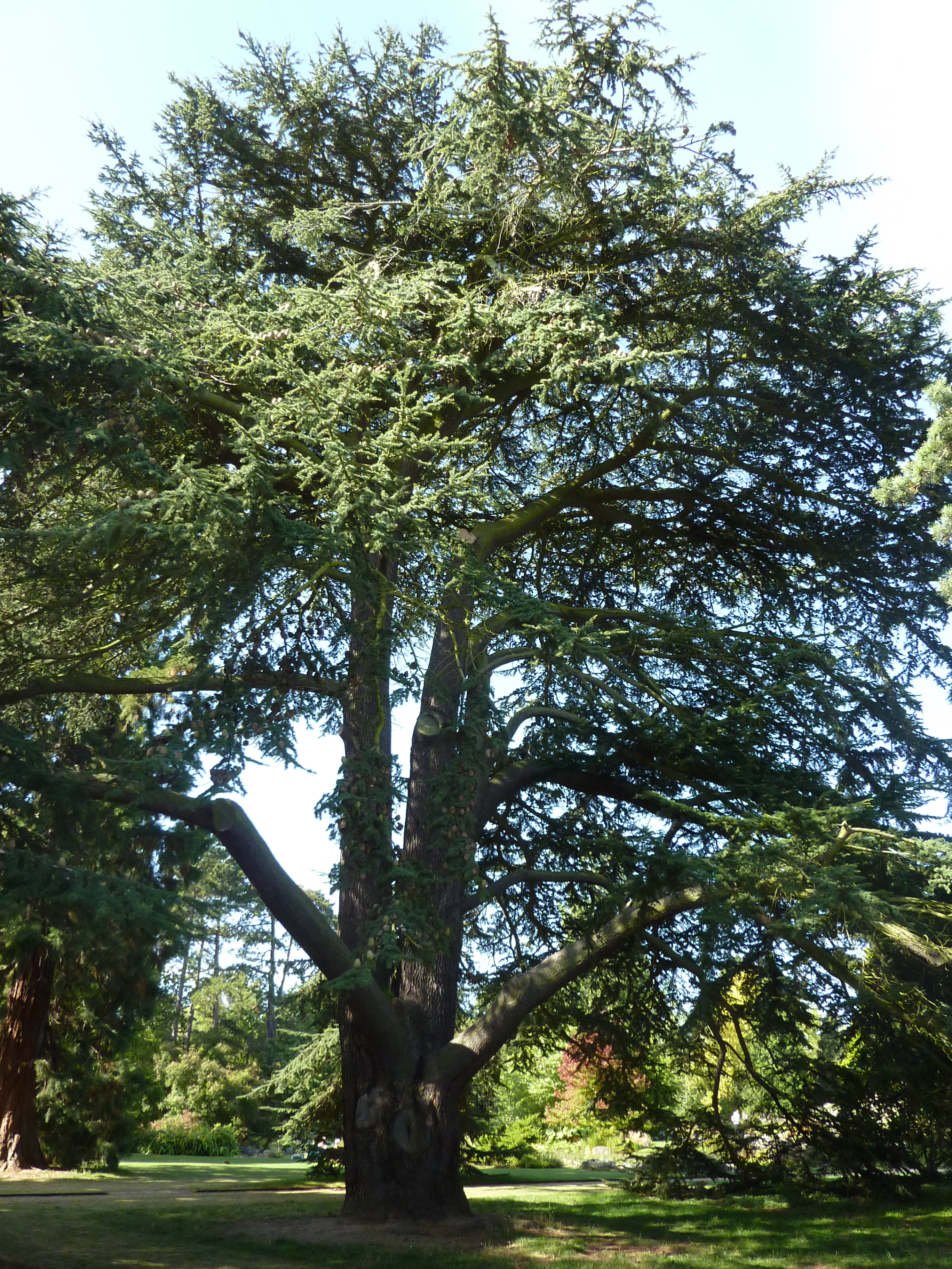 Cedrus libani var. libani, Cambridge University Botanic Garden